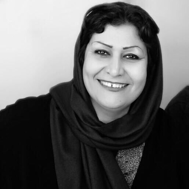 مژگان مشتاق حصاری (زادهٔ ۶ اسفند ۱۳۴۹، اندیمشک، خوزستان) نویسندهٔ معاصر ایرانی است.